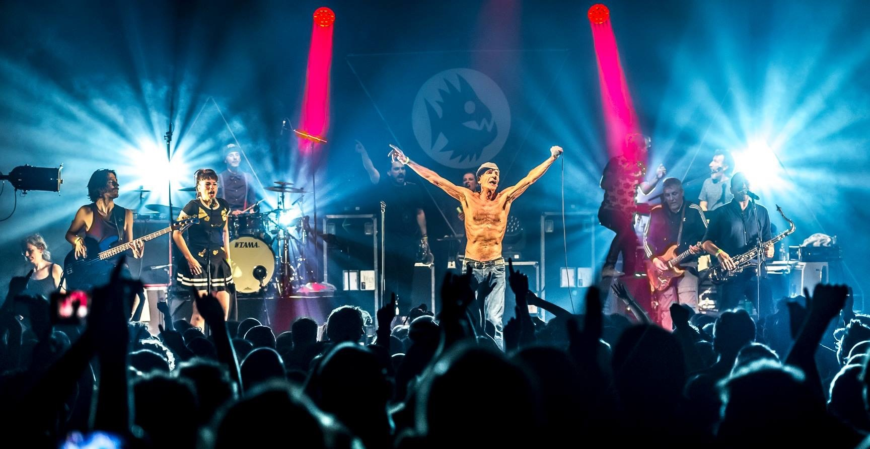 Raoul petite Live La Cigale 2018